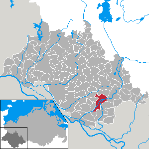 Eldena in Mecklenburg-Vorpommern - district Ludwigslust